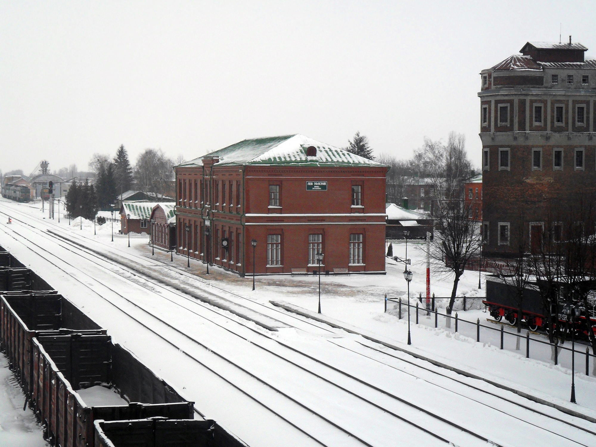 Общий вид на ЖД вокзальный комплекс «Лев Толстой». После реконструкции (2010 г.).